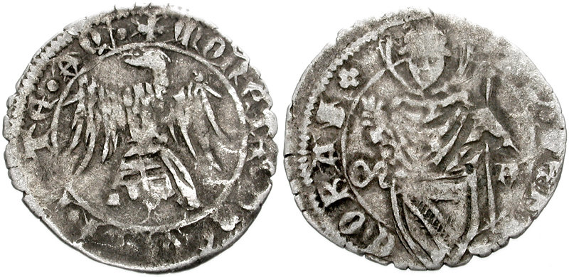 Danaro di Marquardo di Randeck AR Denaro (19mm, 0.89 g, 3h). Eagle standing facing on helmet left, head left, with wings displayed Facing bust of St. Hermagoras, wearing episcopal raiment, raising hand in benediction and holding scepter; patriarchal coat-of-arms below